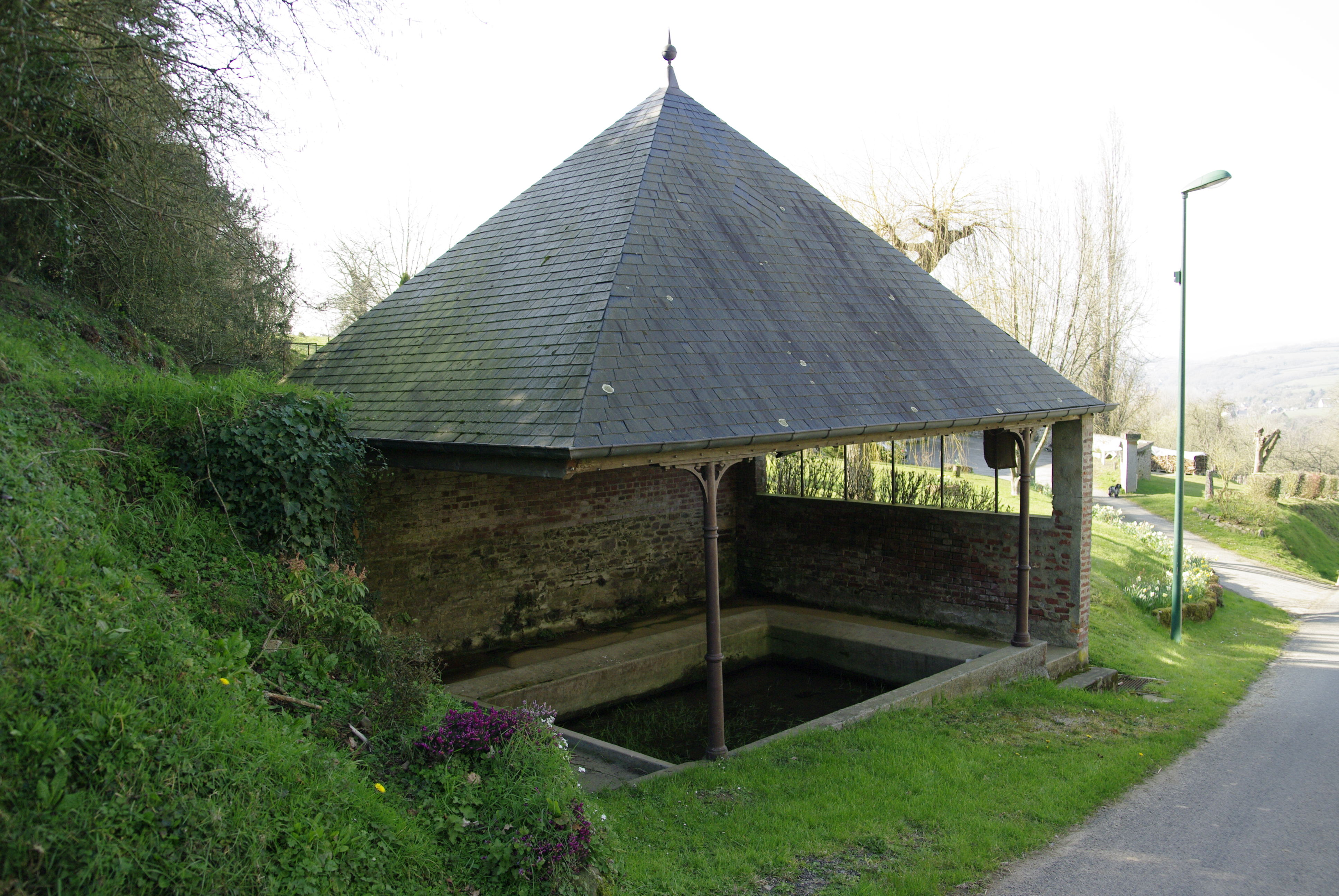 Lavoir de Saint PhilbertsurOrne, Orne.